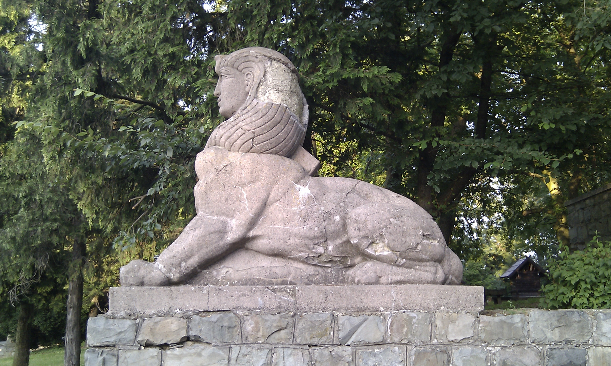 On top of Avala mountain, Serbia.